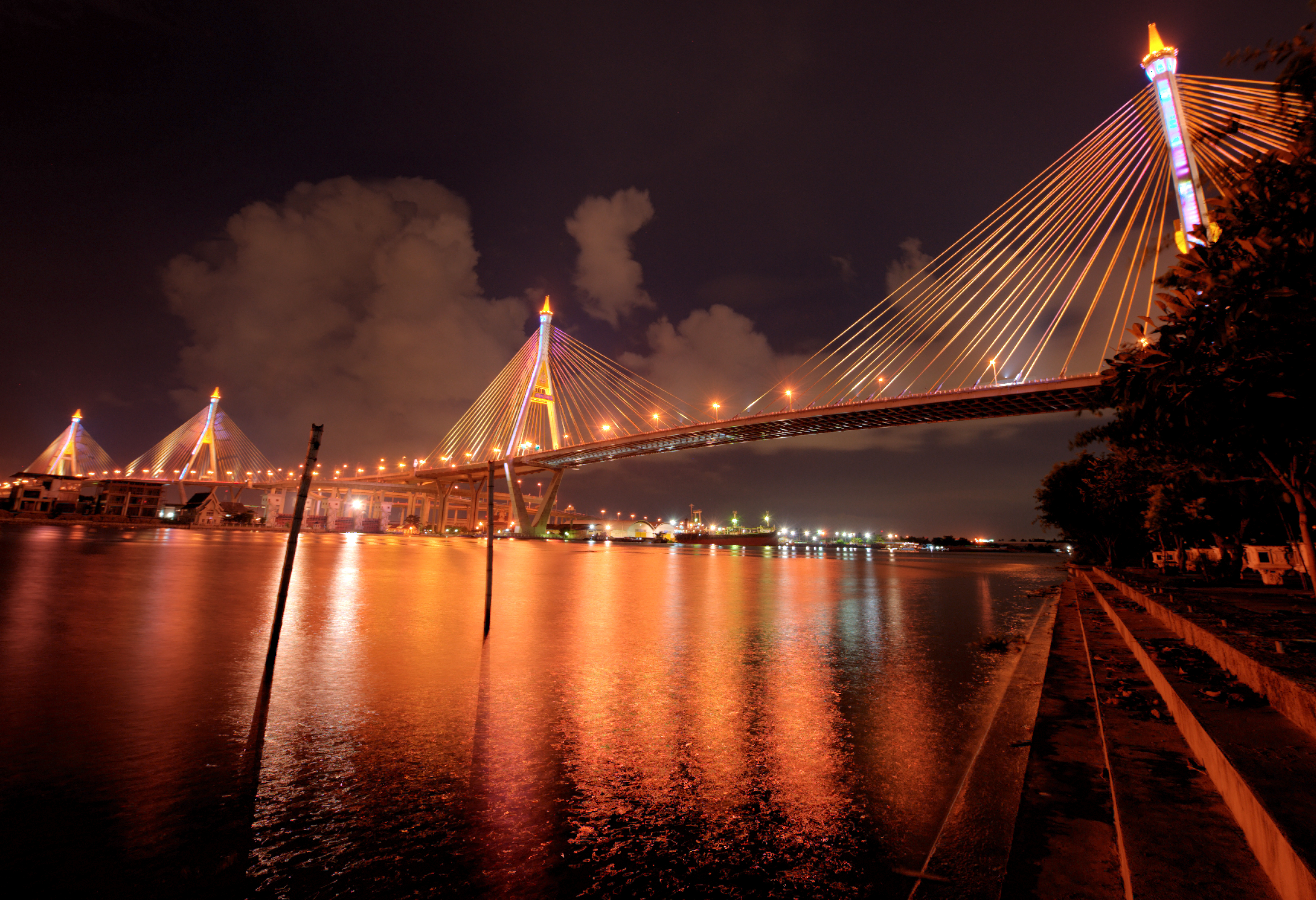 Bhumibol Bridge (สะพานภูมิพล) - Bangkok